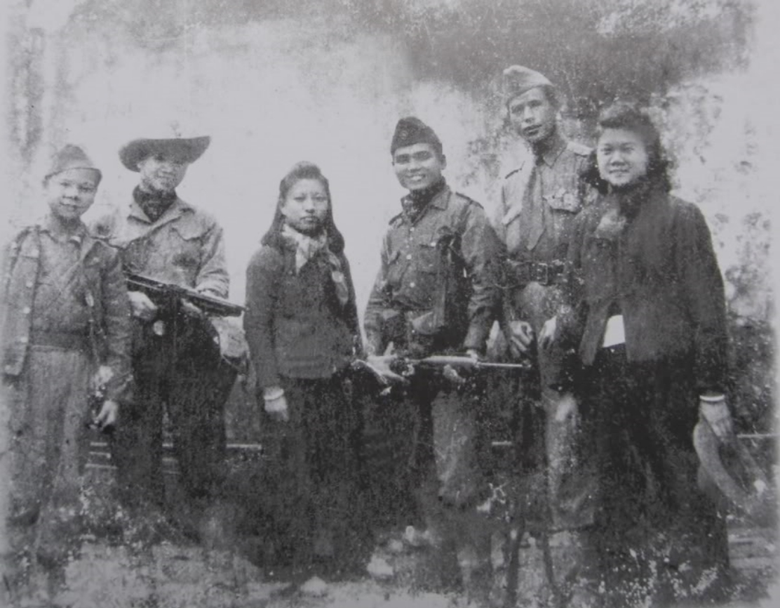 Trung-đội 2 trực-thuộc Tiểu-đoàn 102. Từ trái sang : Vệ-út liên-lạc viên Hồ-quốc-Cốc, chính-trị viên Nguyễn-đình-Truy, y-tá cứu-thương Nguyễn-thị-An, trung-đội trưởng Nguyễn-trọng-Hàm, trung-đội phó Phạm-Mùi, y-tá cứu-thương Lều-thị-Lương.